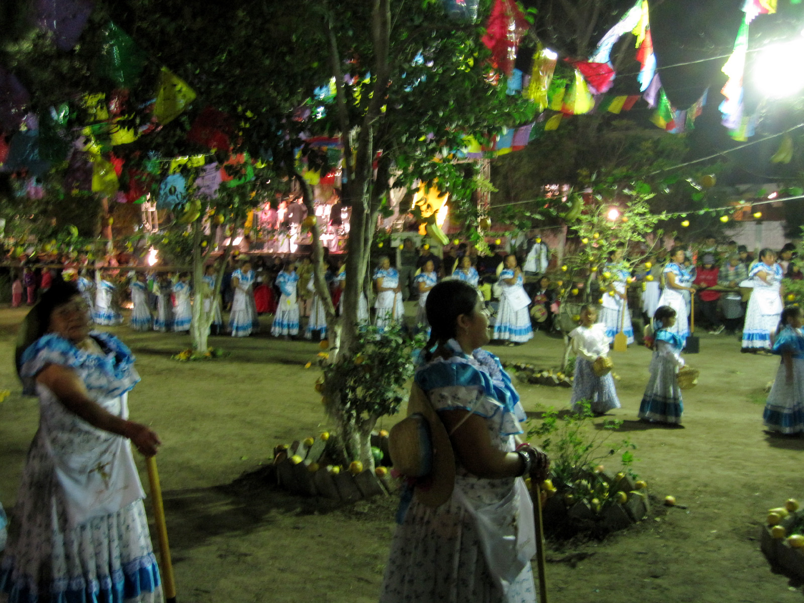 Tradisjonell dans i forbindelse med karnevalet i San Salvador Atenco i Mexico